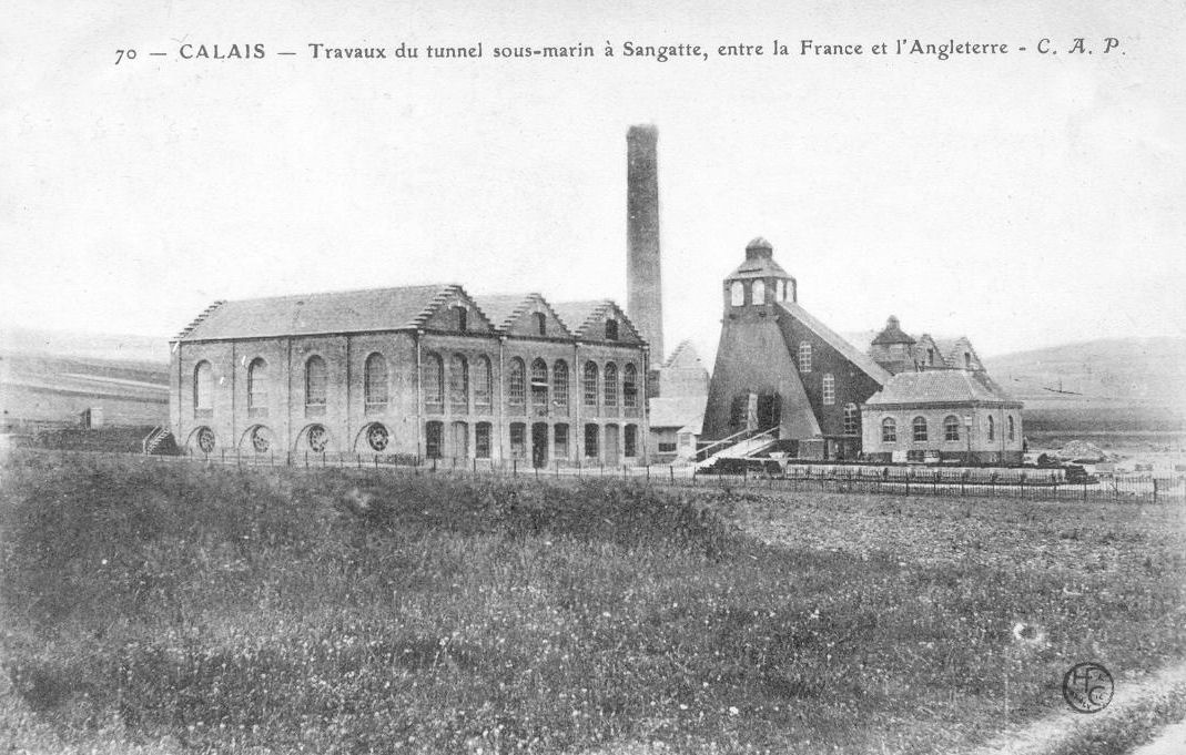 Les installation du puits de Sangatte.